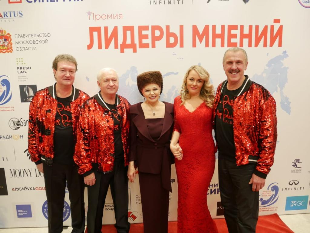 ВИА «Пламя» под руководством Юлии Ариничевой.